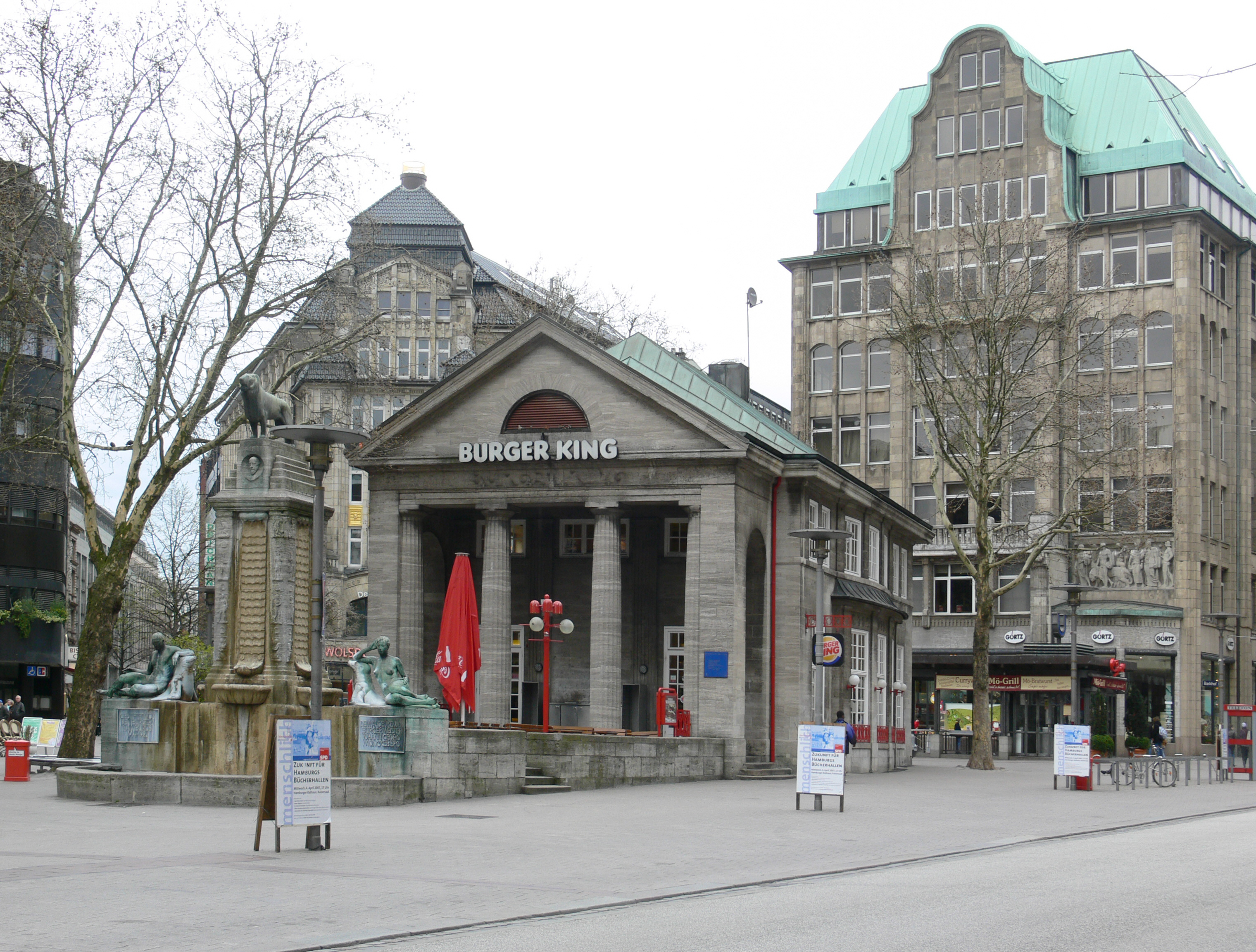 Mönckebergstraße, Einmündung der Spitalerstraße, Hamburg, Germany mit dem Mönckebergbrunnen und dem ursprünglich als Bücherhalle gebauten Gebäude von 1914 (bis Frühjahr 2009 Burger King). Brunnen und Bücherhallengebäude stehen jeweils seit 30. Mai 1958 unter Denkmalschutz. This is a photograph of an architectural monument. ,14866,29932